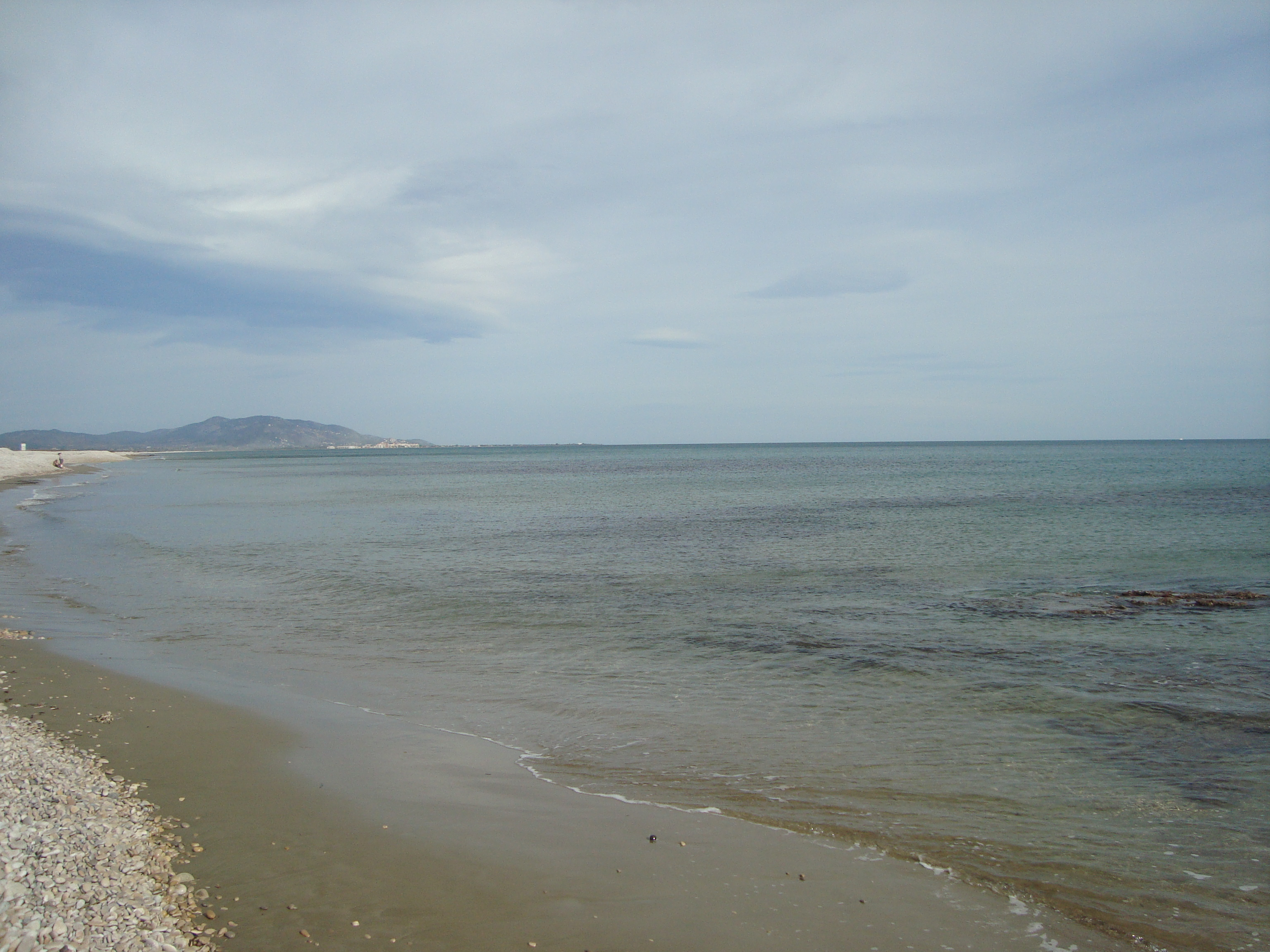 Platja del Codolar (Cabanes) This is a a photo of a beach in the Land of Valencia, Spain, with id: PL-1432